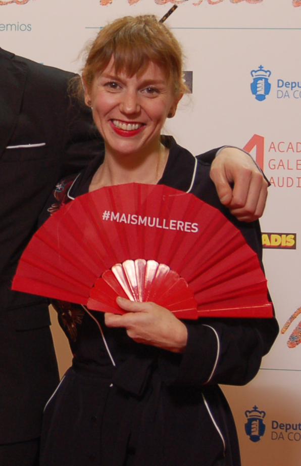 María Vázquez nos Mestre Mateo 2017